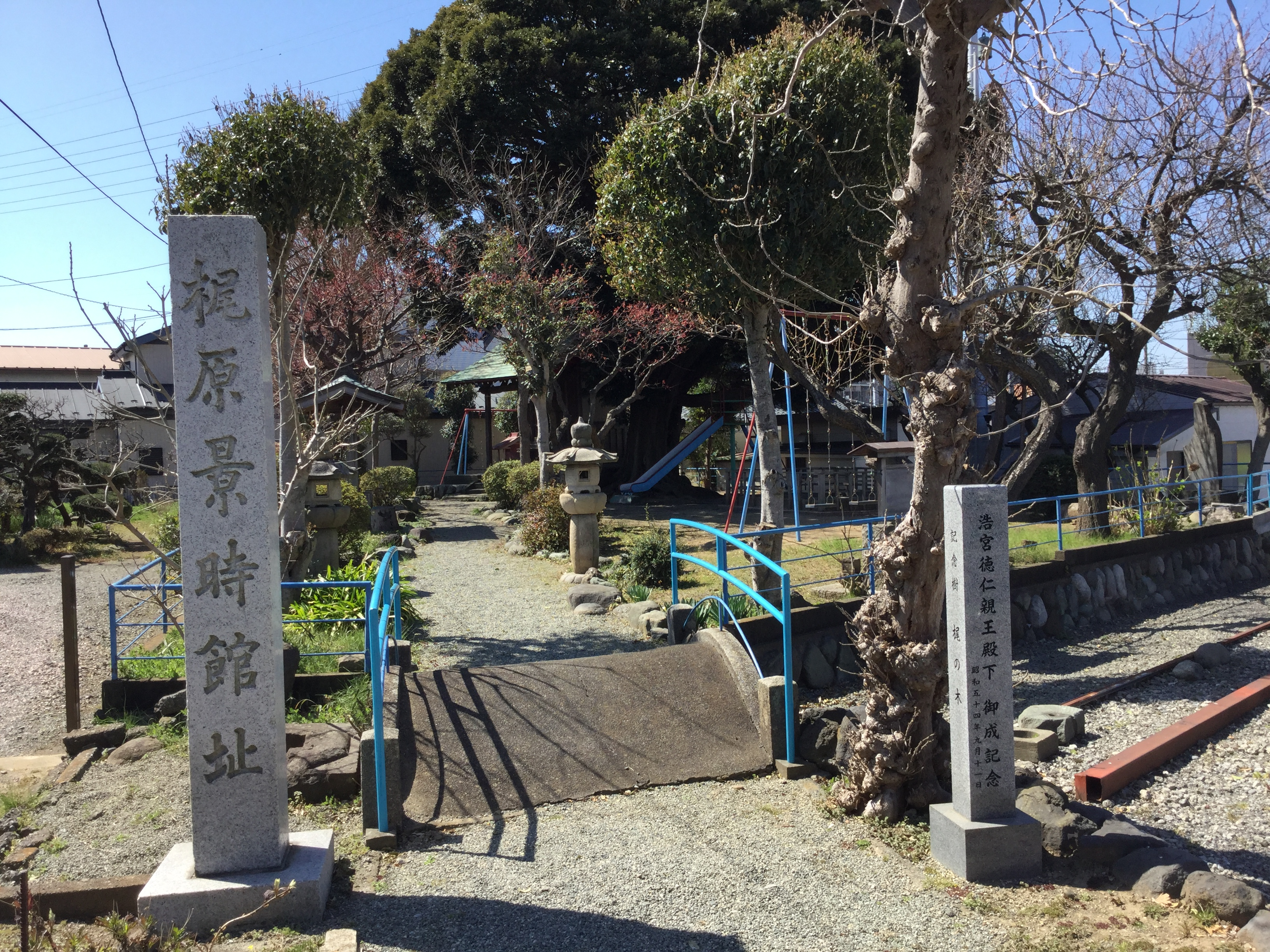 神奈川県高座郡寒川町にある梶原景時館趾